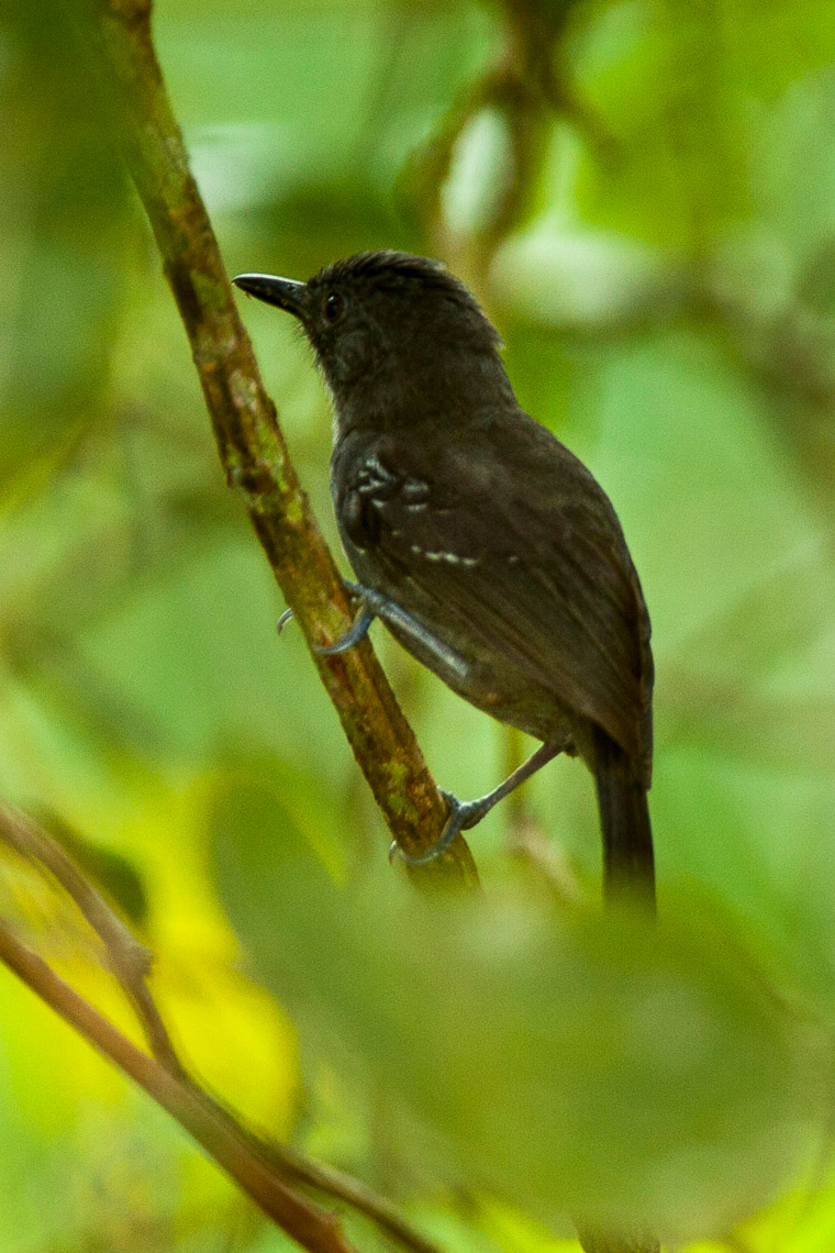 Dusky Antbird - Panama_H8O3094